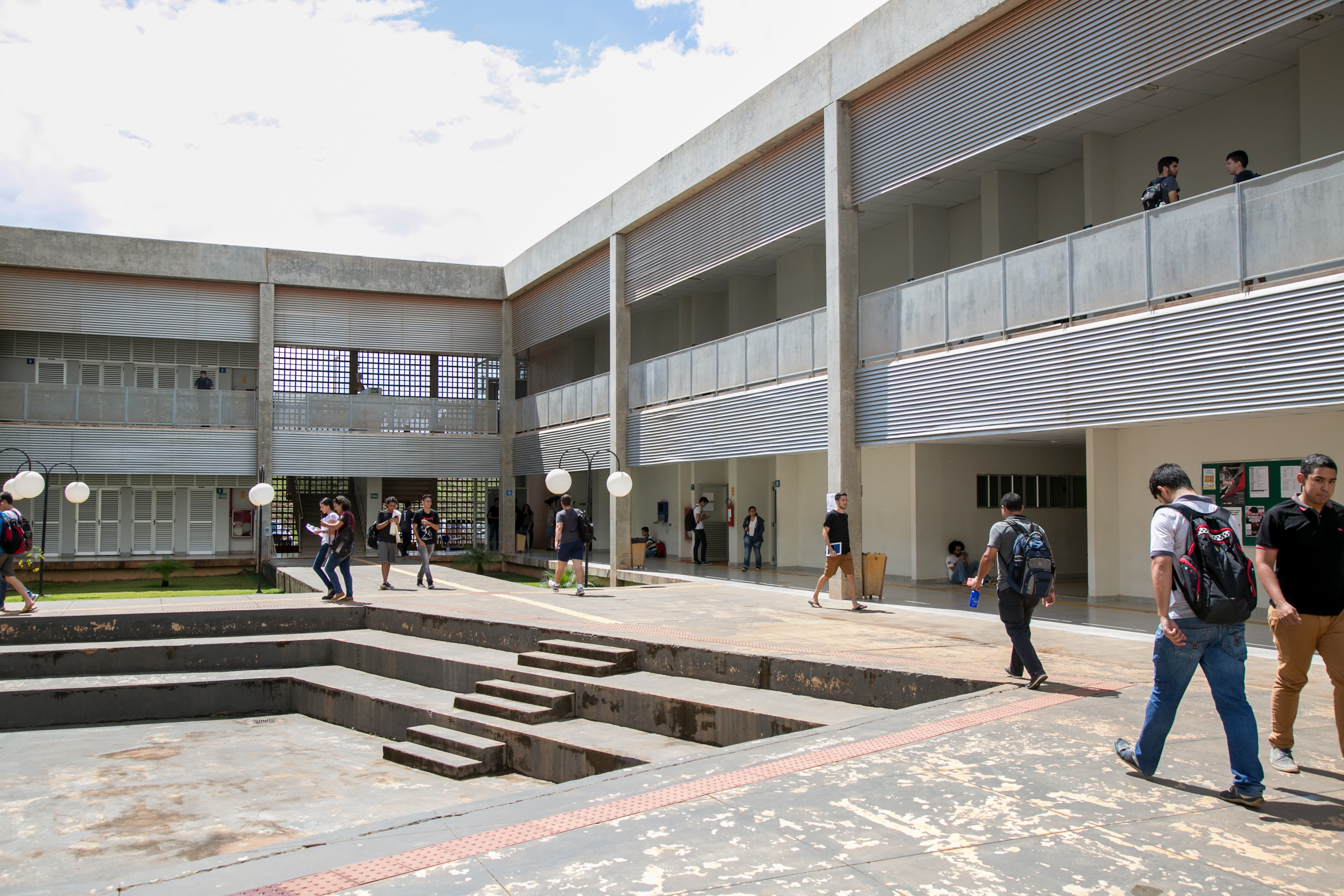 Brasília, 19 de Março de 2018. Técnicos administrativos, professores e alunos do Campus da UnB no Gama (FGA) comemoram dez anos de existência. Foto: Secom/UnB. ATENÇÃO – As informações, as fotos e os textos podem ser usados e reproduzidos, integral ou parcialmente, desde que a fonte seja devidamente citada e que não haja alteração de sentido em seus conteúdos. Crédito para textos: nome do repórter/Secom UnB ou Secom UnB. Crédito para fotos: nome do fotógrafo/Secom UnB.